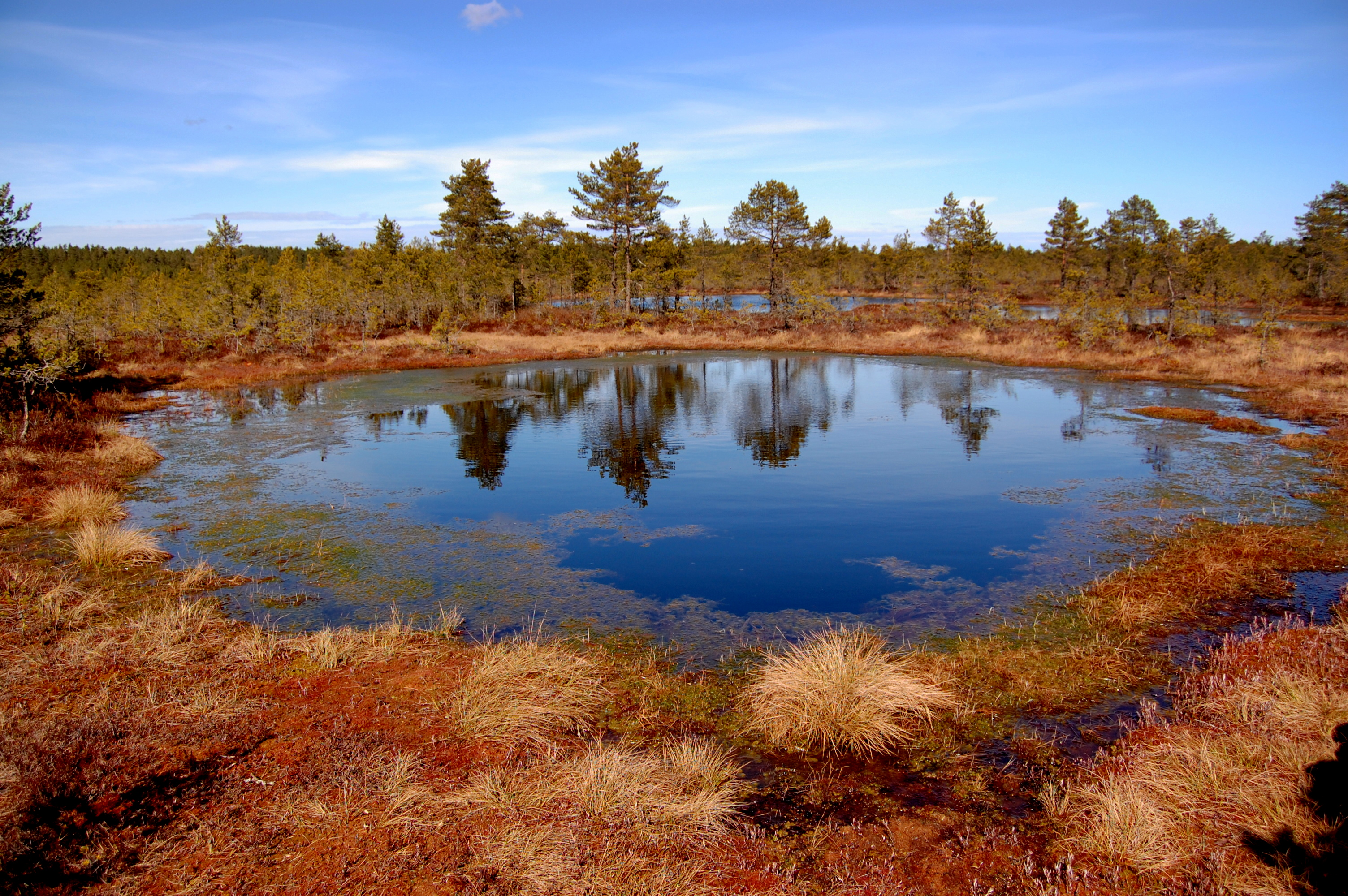 Bog lake in Viru raba, Estonia